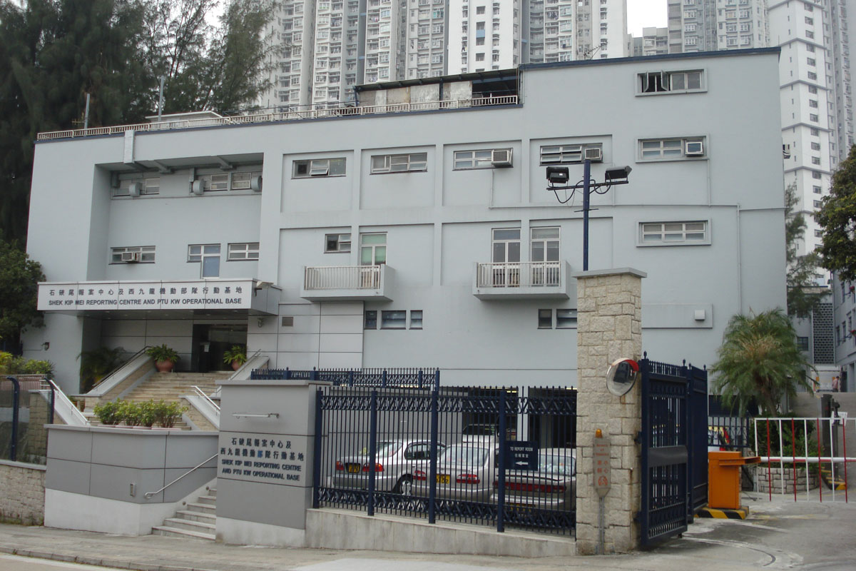 Former Sei Kep Mei Police Station